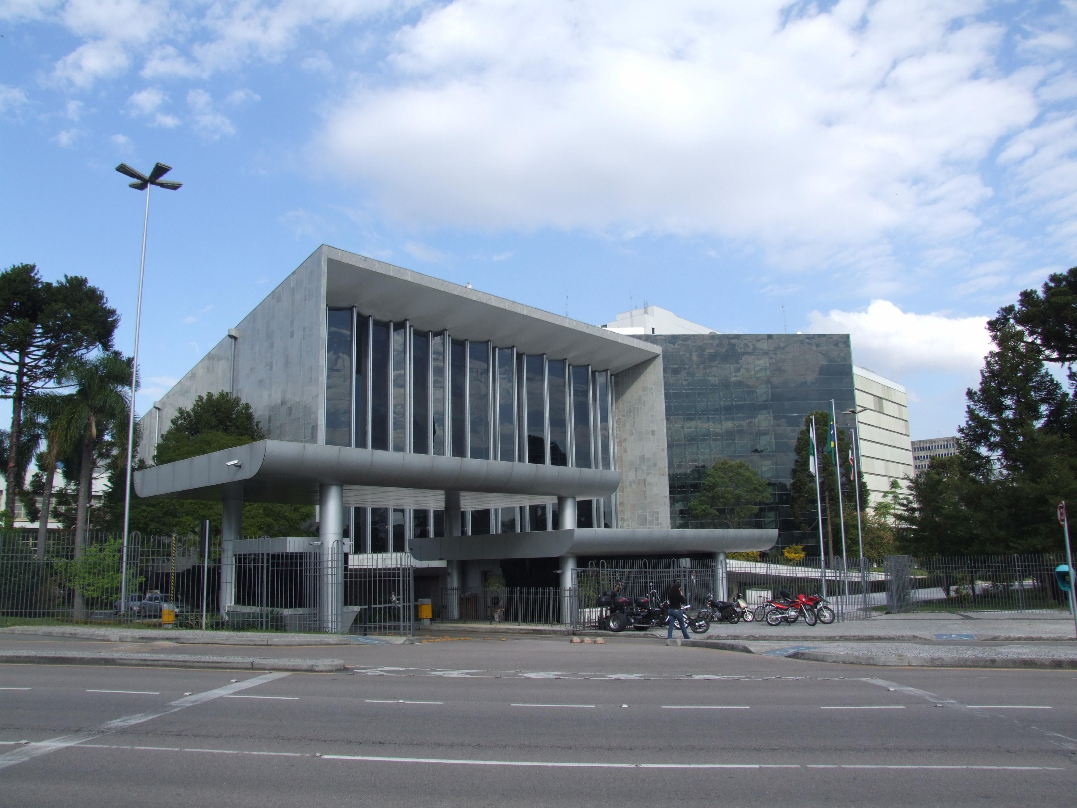 Assembléia legislativa do Paraná, ao lado da Av. Candido de Abreu, vistos a partir do palácio iguaçu. Paraná's house of representatives, rightside of Candido de Abreu av, as seen from Palácio Iguaçu. Paraná ,,reichstag, links Candido de Abreu Strasse, gesehen von Palácio Iguaçu.